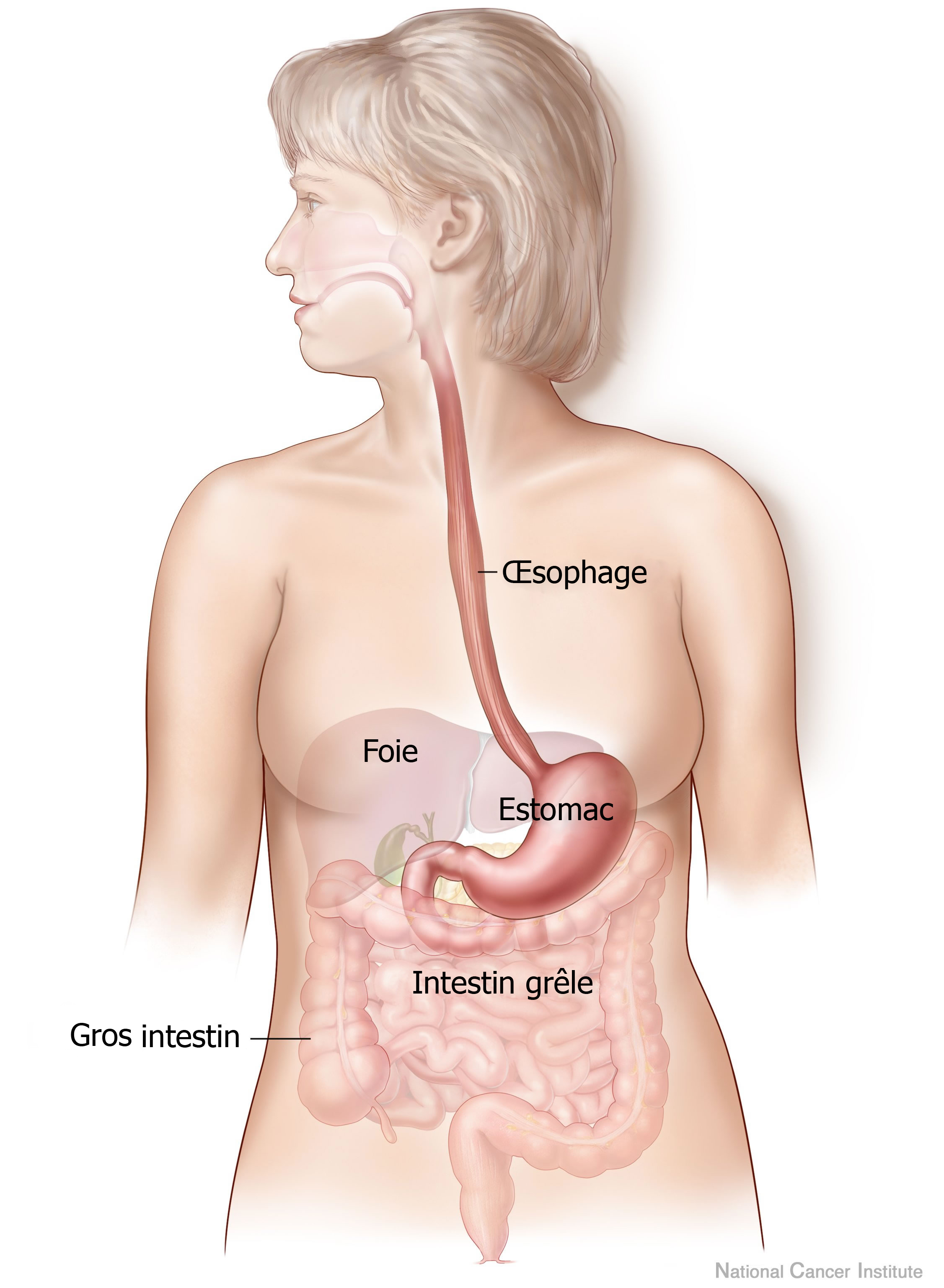 Systeme digestif